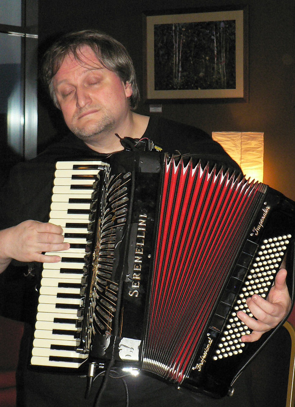 Orosz Zoltán